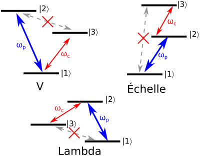 Configurations des niveaux d'énergie permettant la transparence induite électromagnétiquement.